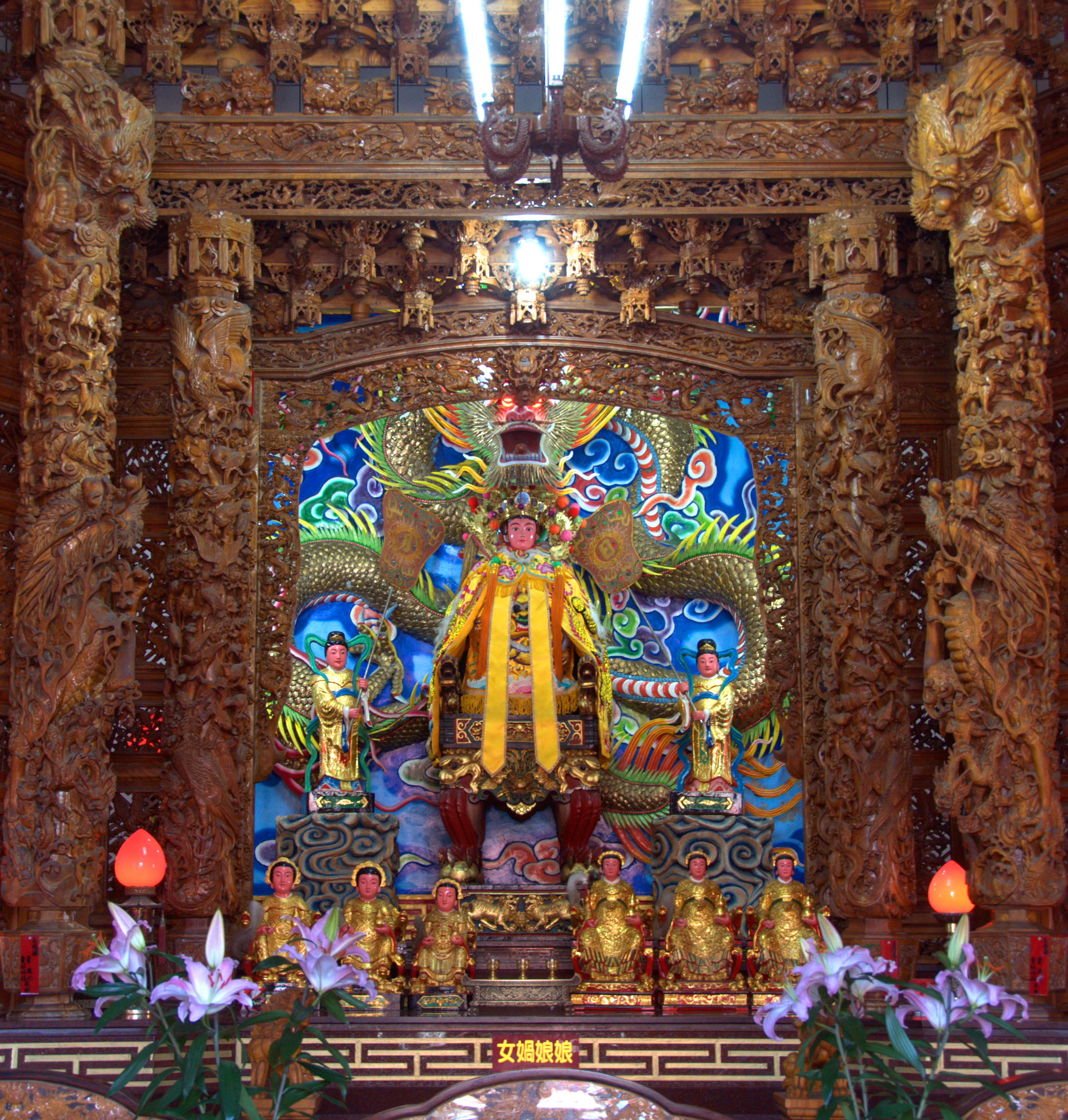 台灣宜蘭縣大福補天宮之女媧娘娘神像。